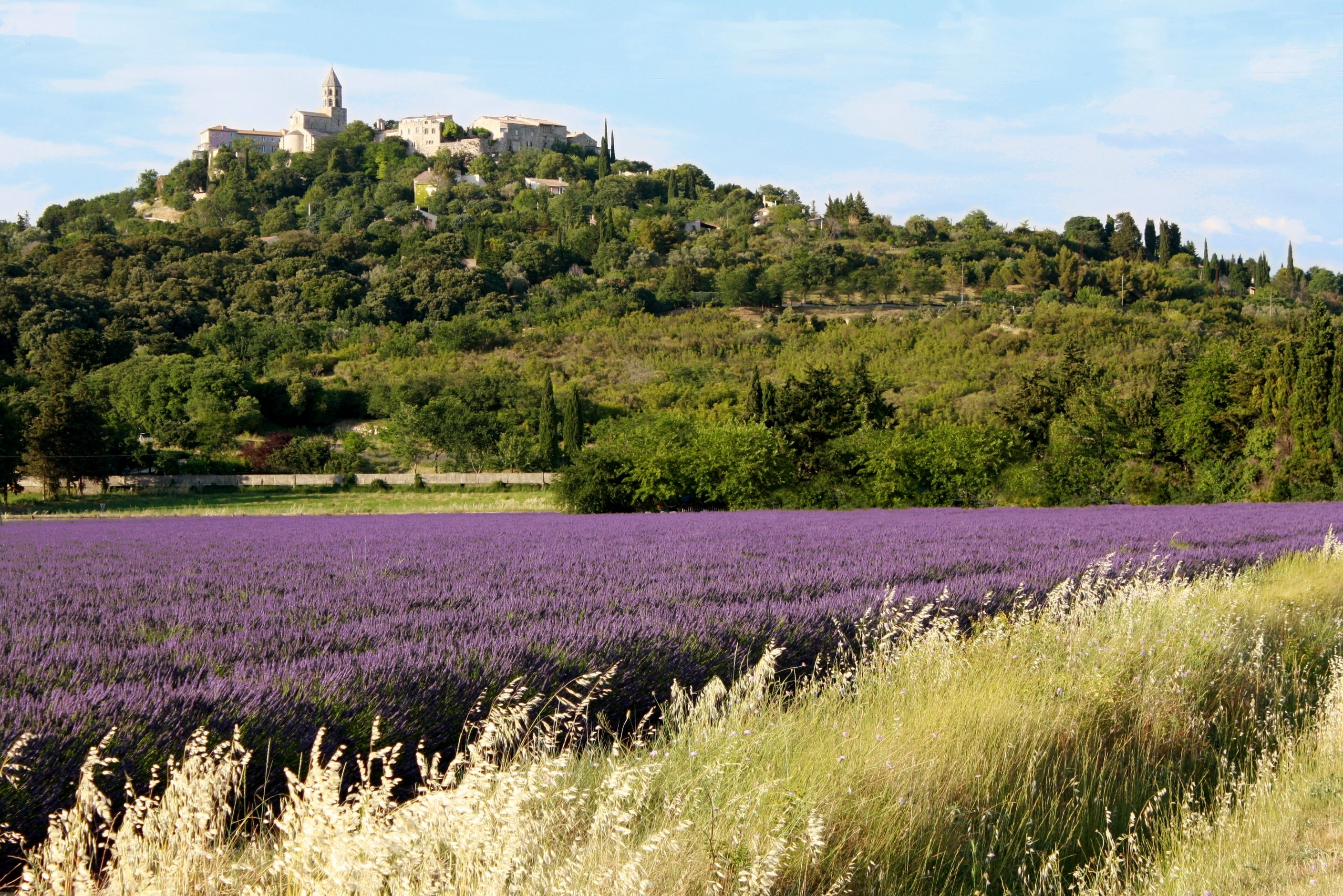 26700 La Garde-Adhémar, France